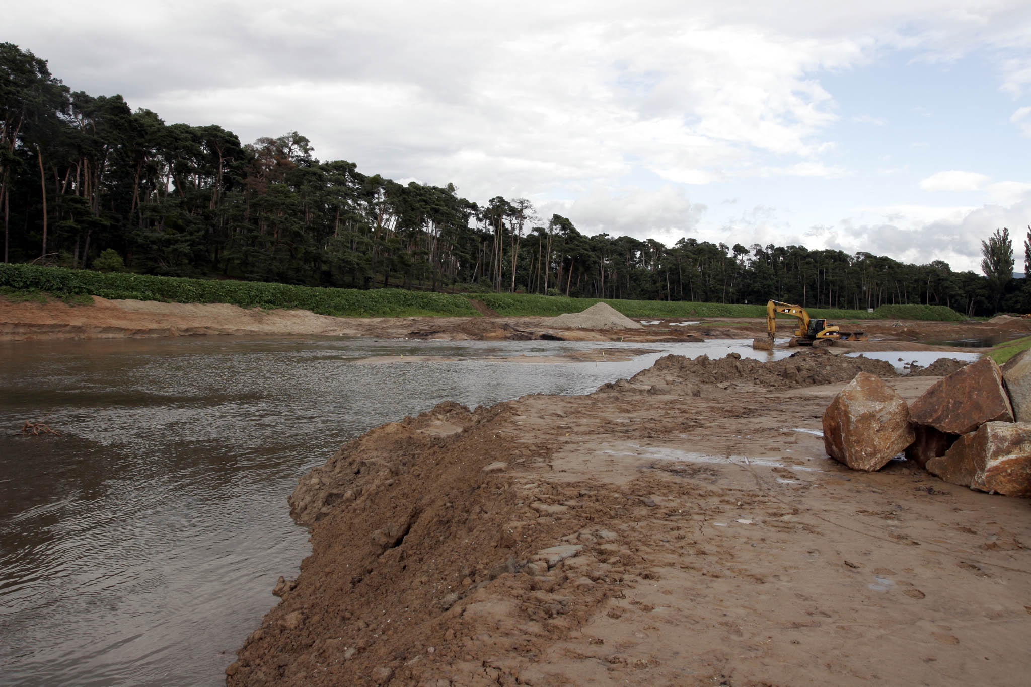 Die Renaturierungsmaßnahmen (Beginn März 2007) der Weschnitz bei Lorsch, nördlich der Wattenheimer Brücke, am 23. Juni 2007.